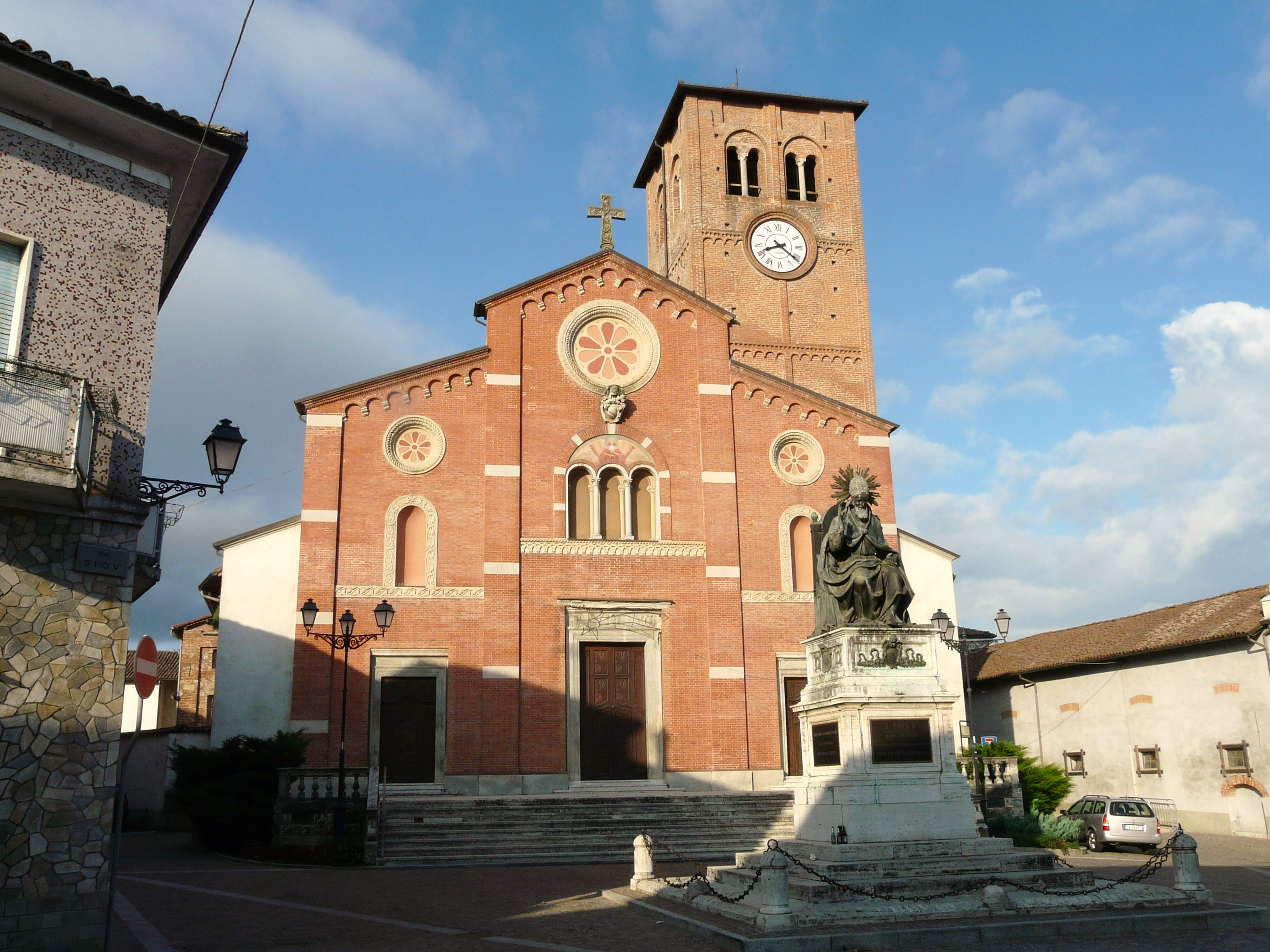 Chiesa dei Santi Pietro e Pantaleone, Bosco Marengo, Piemonte, Italia